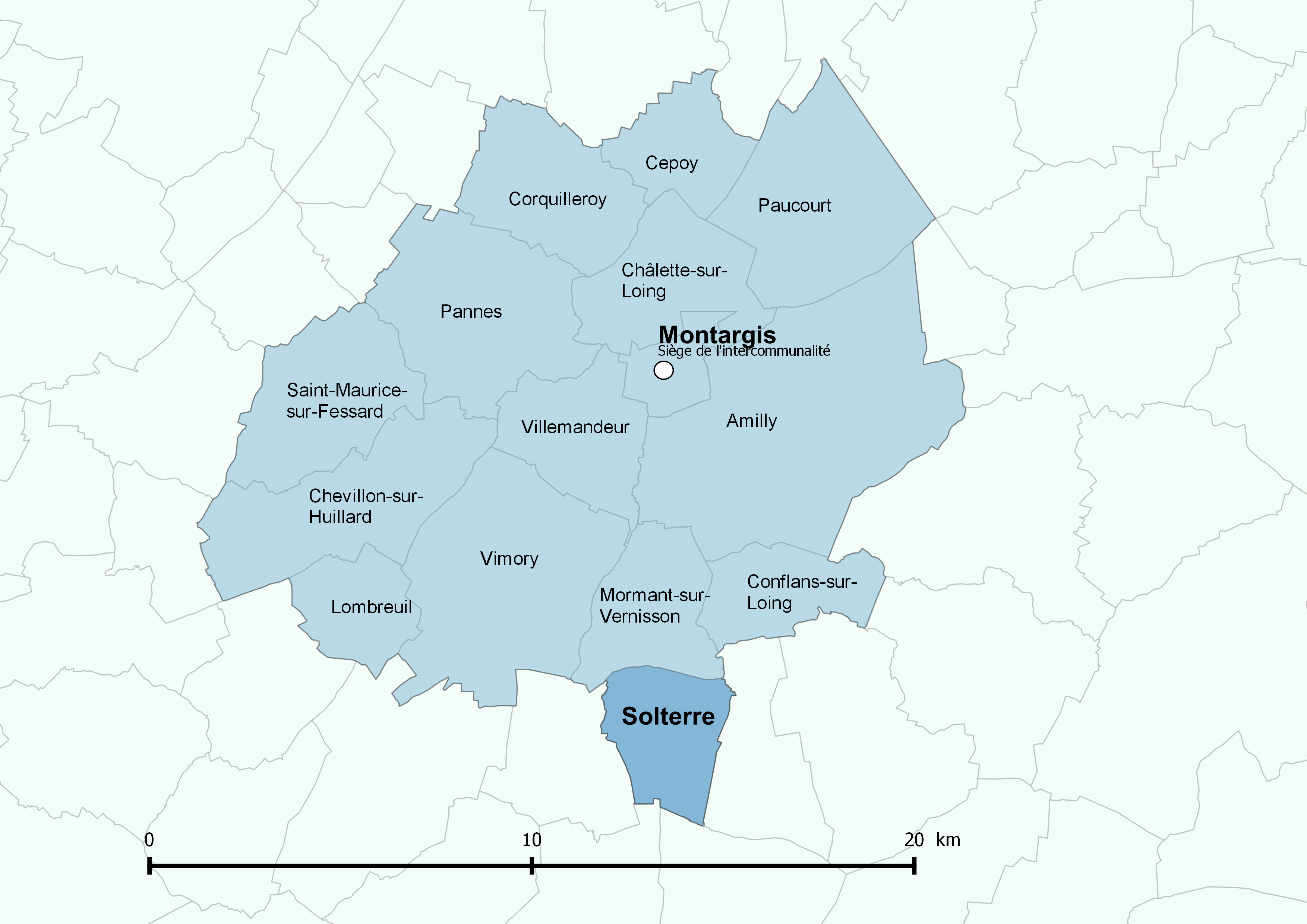 Périmètre de l'Agglomération montargoise et rives du Loing - Positionnement de la commune de Solterre